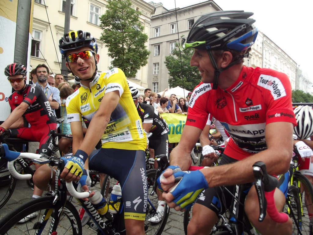 Zdjęcie zrobione podczas III etapu 70. jubileuszowego Tour de Pologne w Krakowie.